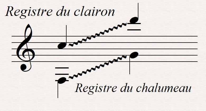 Superposition des registre grave et aigu: Notes sur une clarinette ayant un doigté commun (à l'exception de la clef de quintoiement)